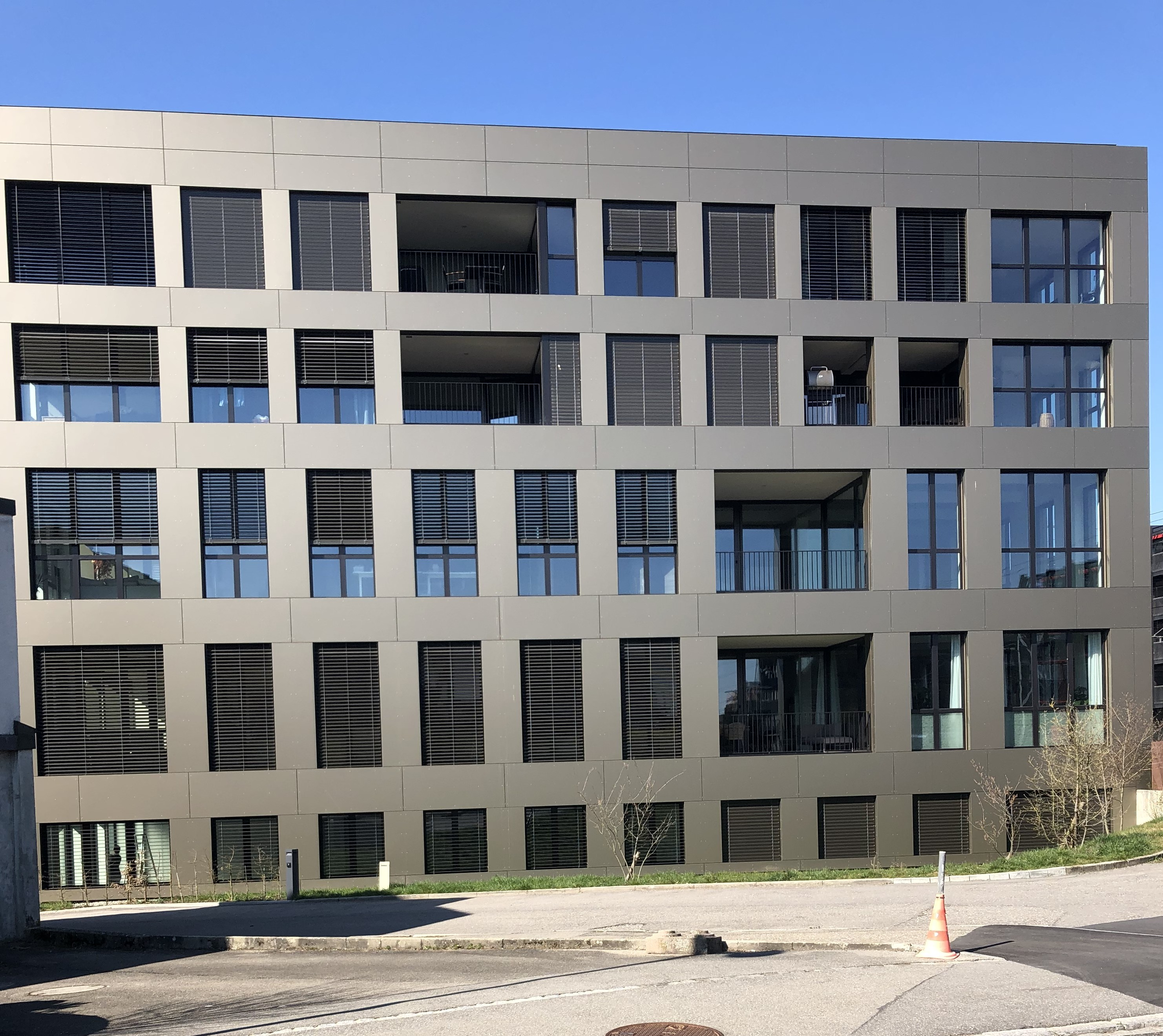 Stapfenacker Wohnhaus an der Bahnlinie